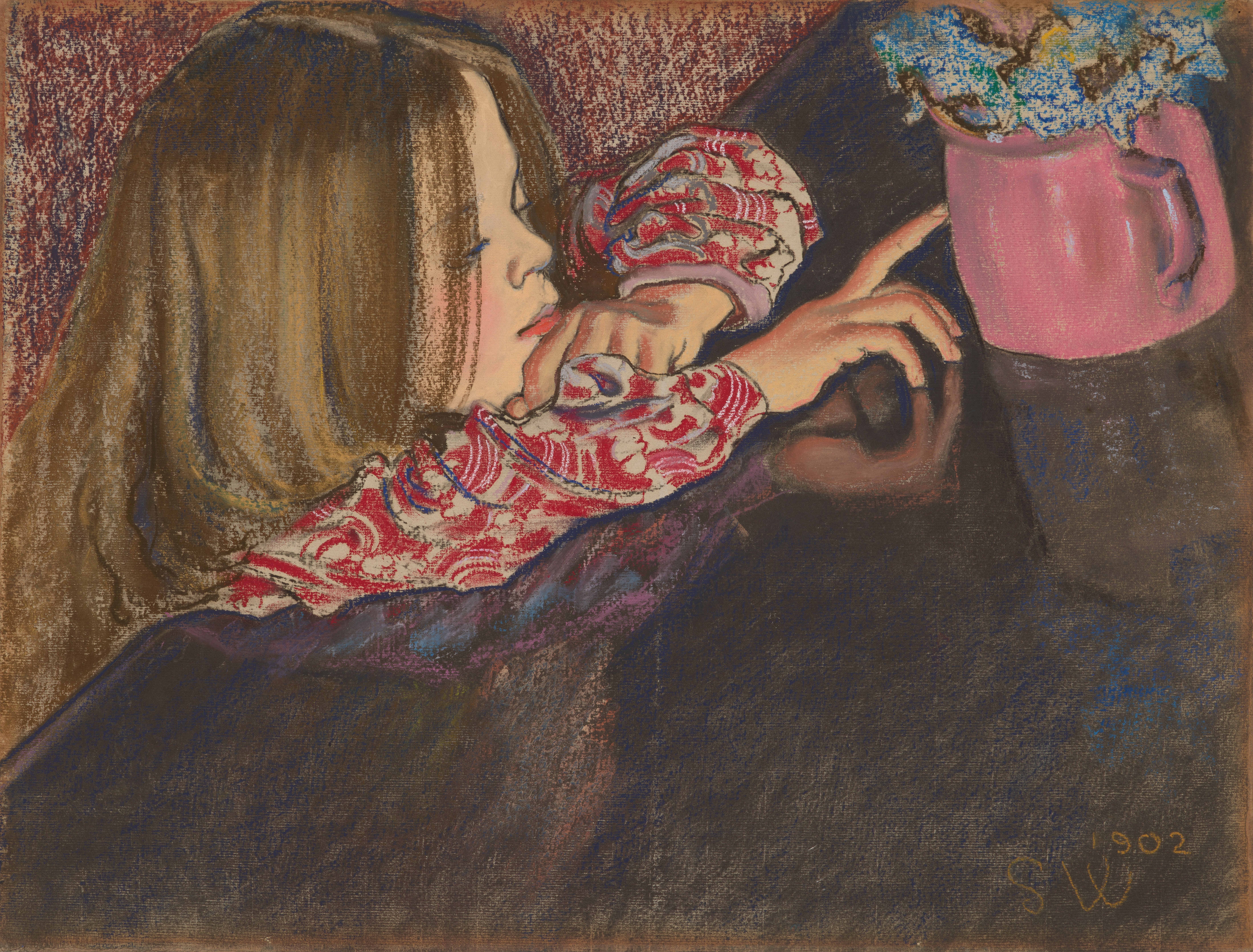 Dziewczynka z wazonem z kwiatami, Pastel. 47,5 x 62,8 cm